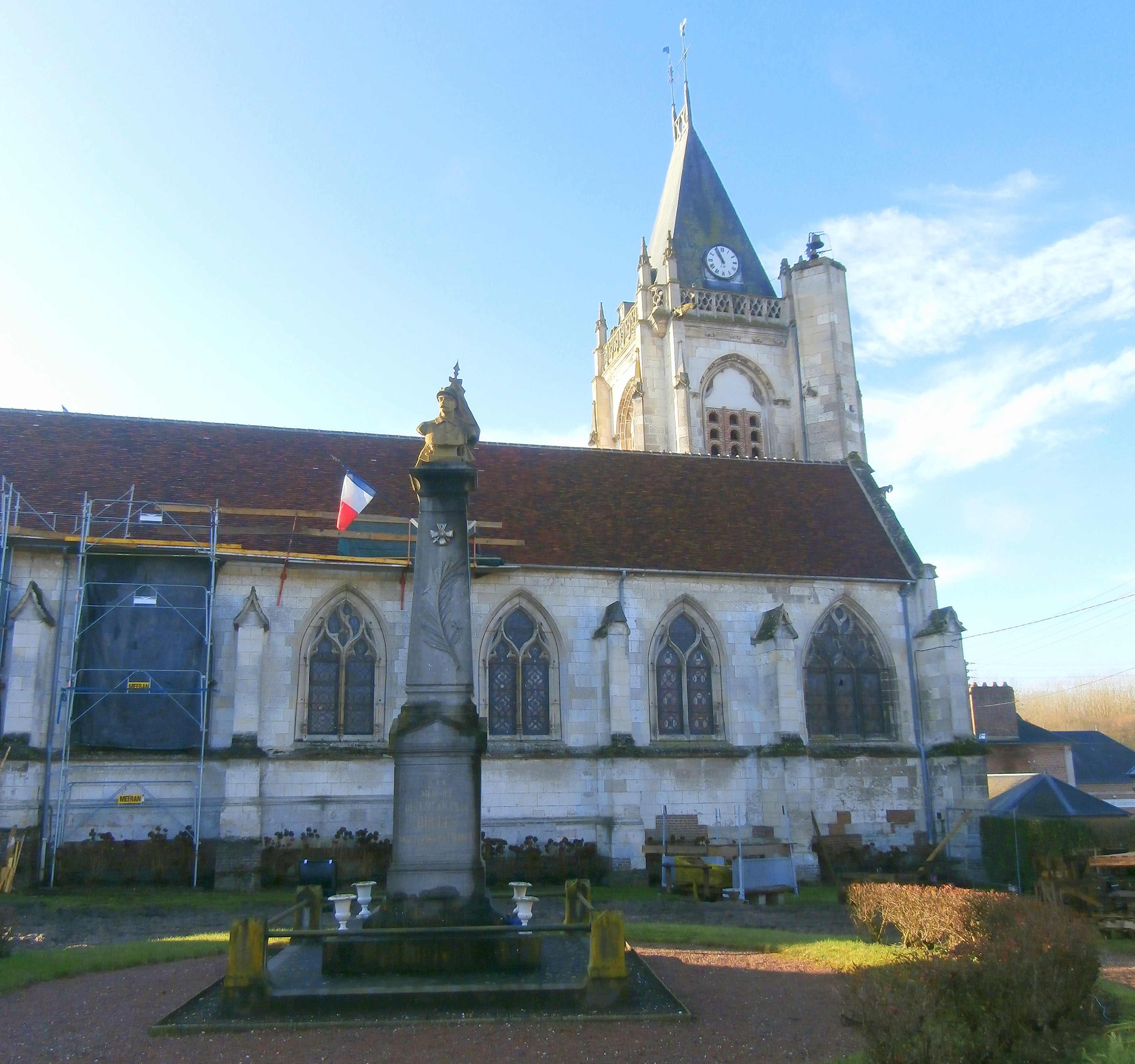 L'église Saint-Martin de Bulles (60).